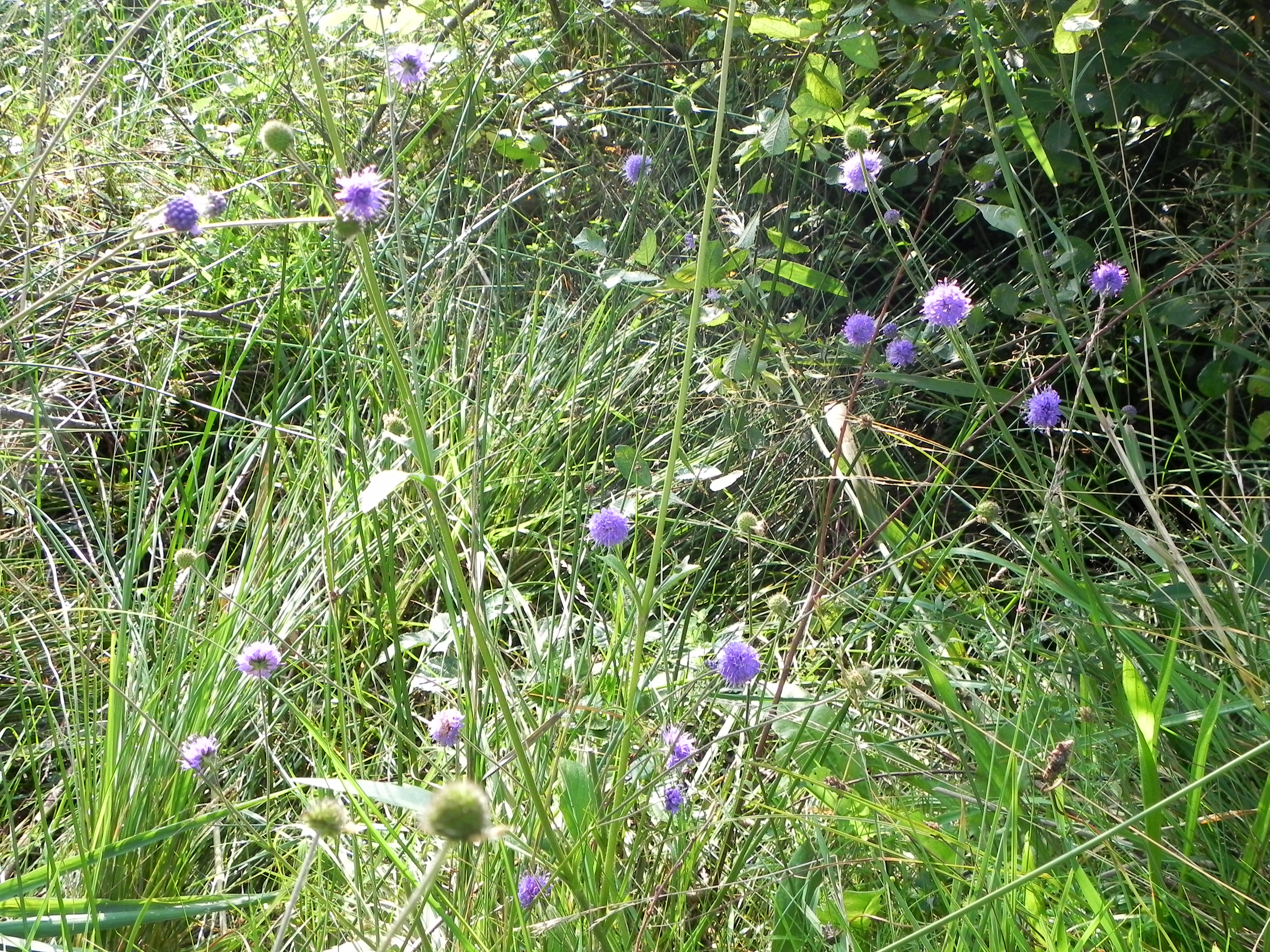 Locker verzweigte Blütenstände des gewöhnlichen Teufelsabbiss (Succisa pratensis), Südheide (Germany)